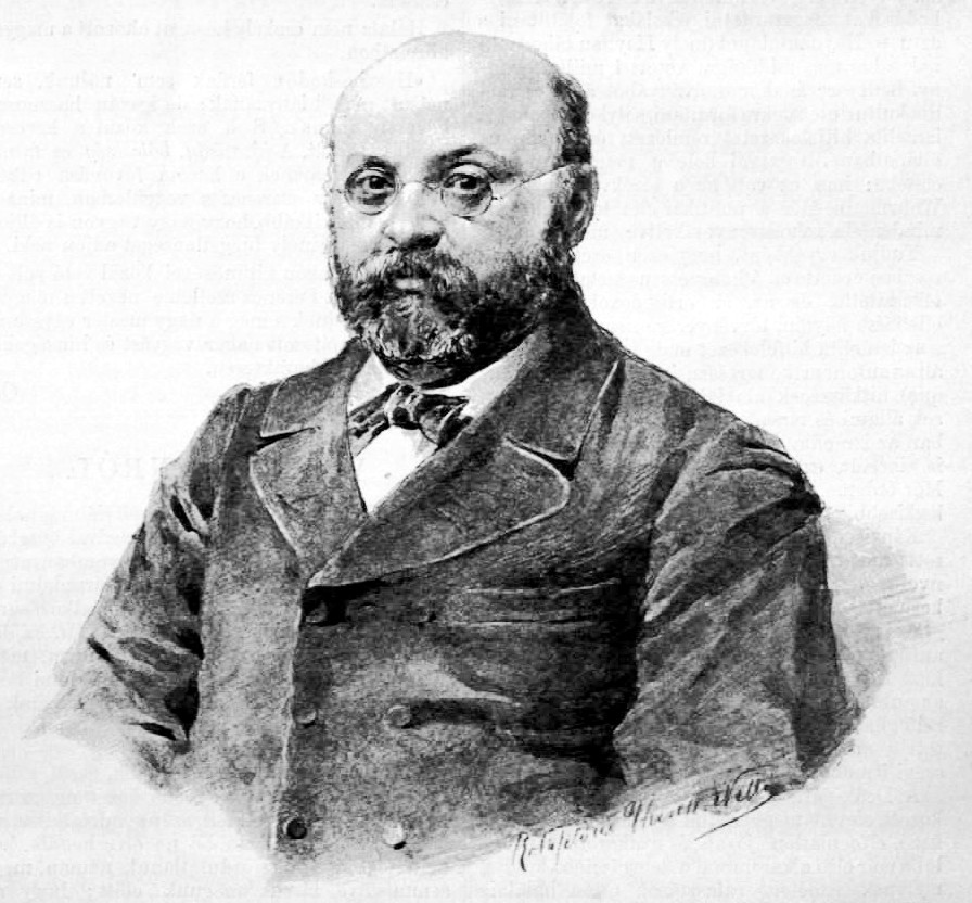 Wahrmann Mór (1831–1892) nagykereskedő, politikus portréja. Radóné Hirsch Nelly rajza